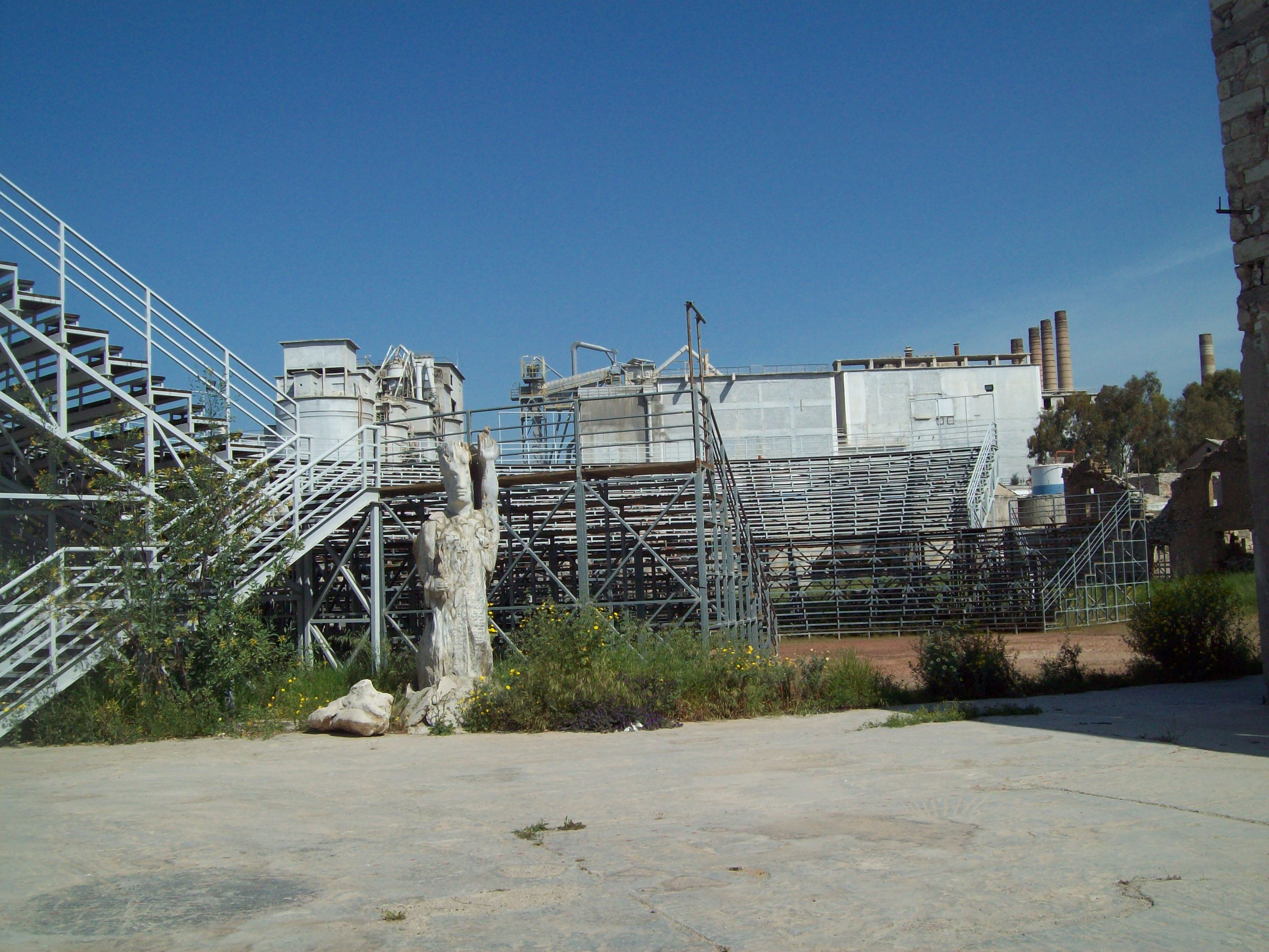 ΠΑΛΑΙΟ ΕΛΑΙΟΥΡΓΕΙΟ ΕΛΕΥΣΙΝΑΣ, ΧΩΡΟΣ ΠΡΑΓΜΑΤΟΠΟΙΗΣΗΣ ΦΕΣΤΙΒΑΛ ΑΙΣΧΥΛΕΙΩΝ,ΤΟ ΘΕΑΤΡΟ